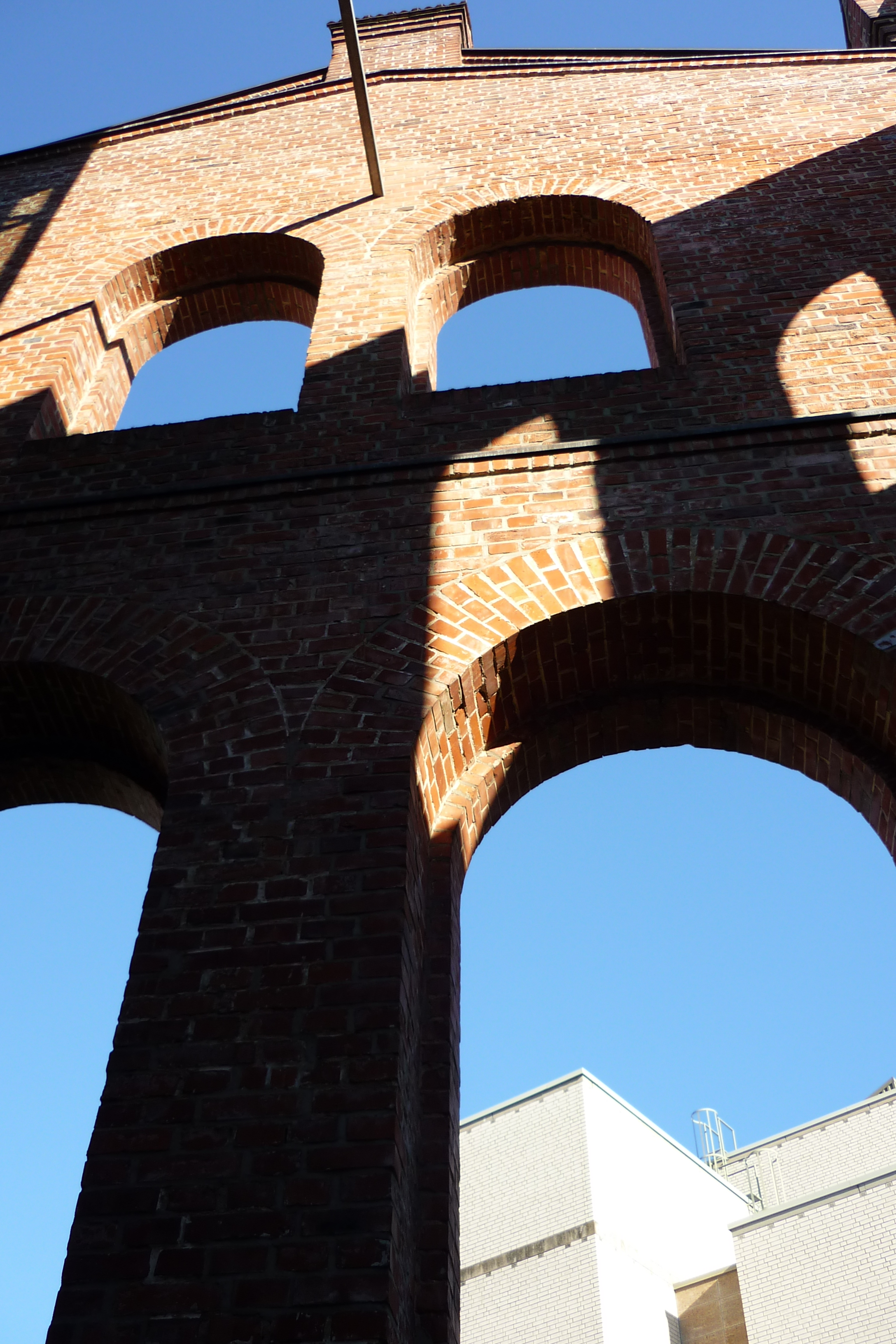 Universität Kassel - Sophie Henschel Haus (Campus am HoPla)